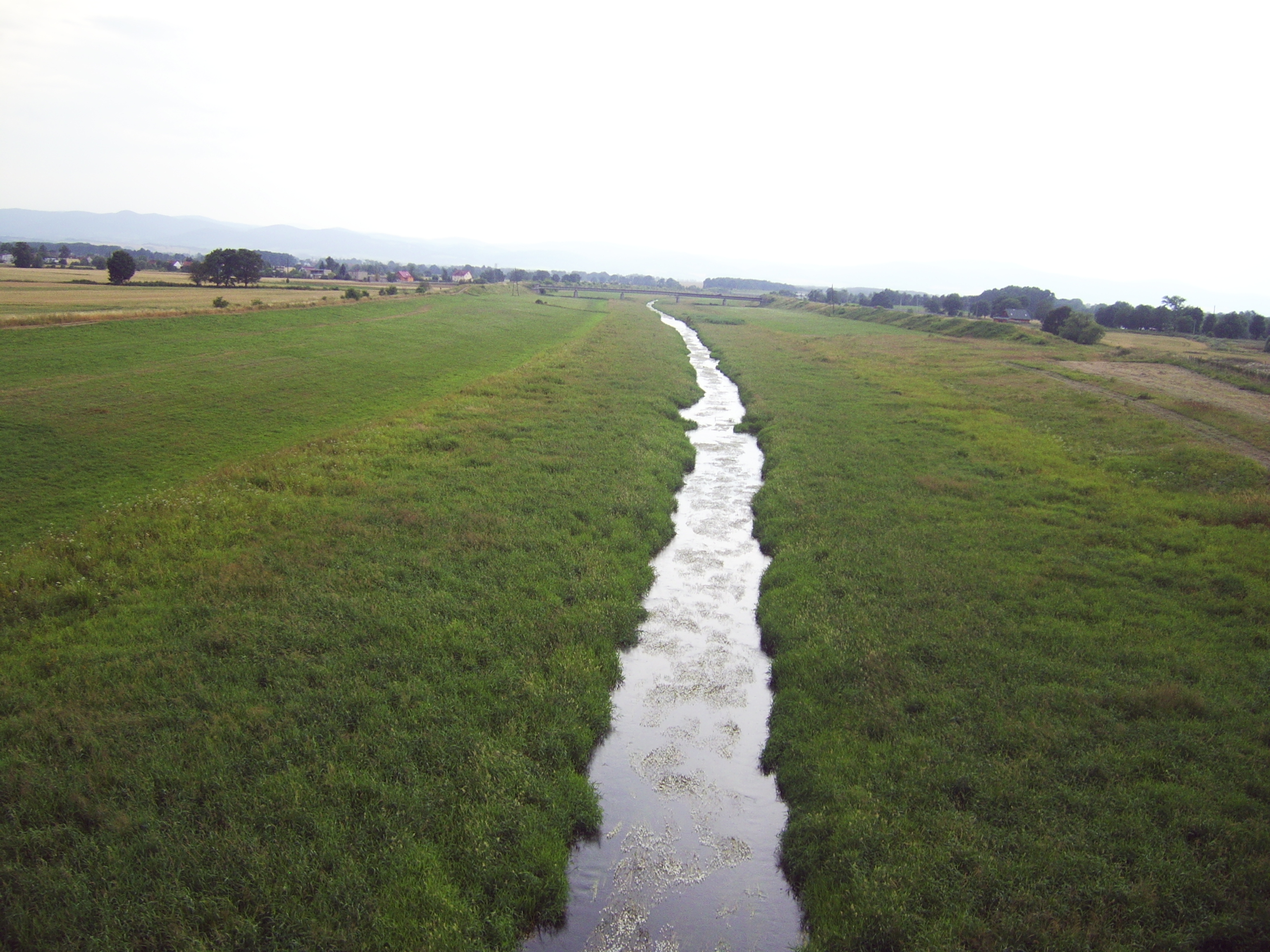 Otmuchowsko-Nyski Obszar Chronionego Krajobrazu